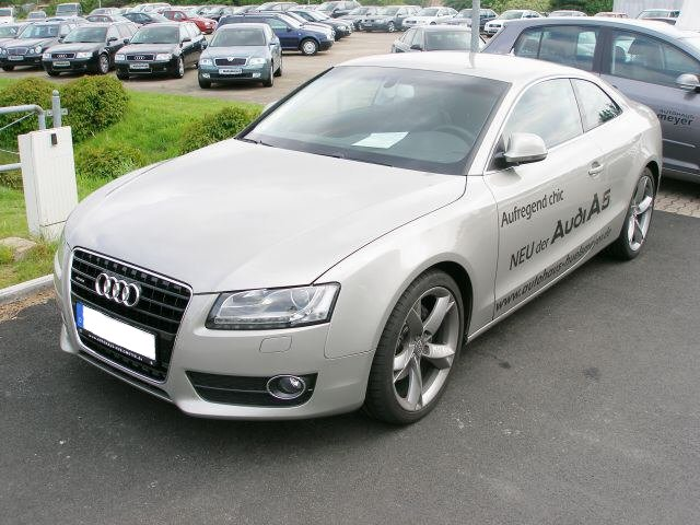 Audi A5